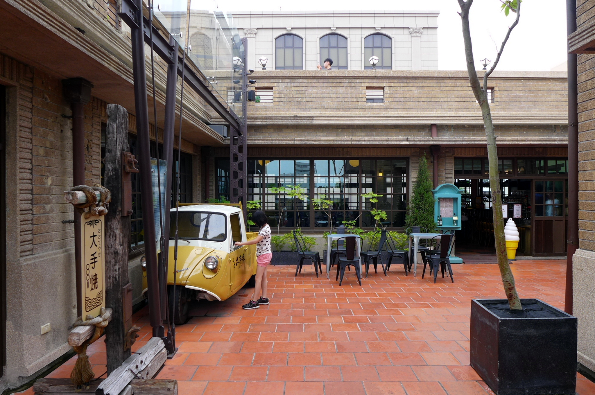 Hayasi Department Store Level 5 Podium